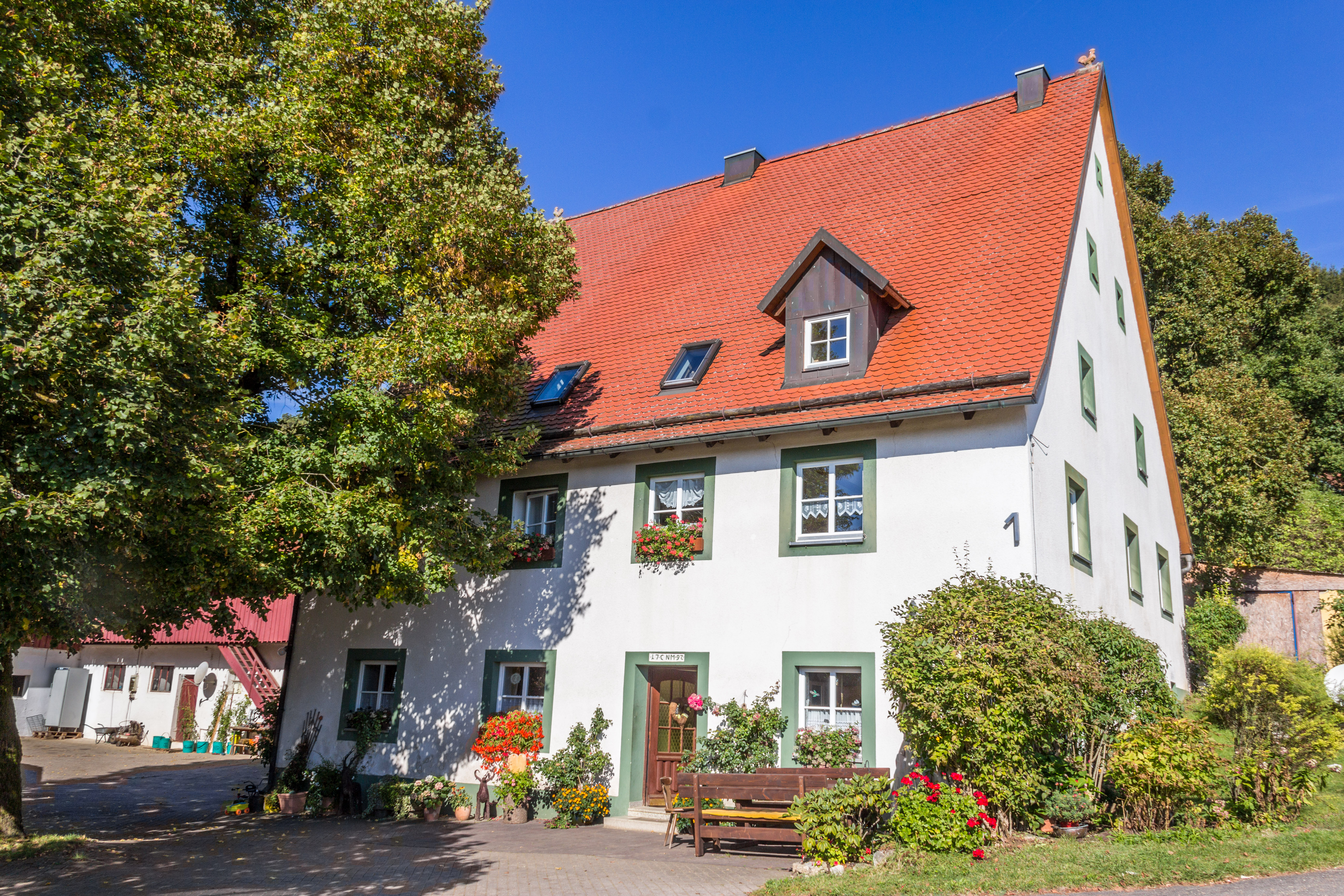 Bauernhaus, Zweigeschossiger, verputzter Massivbau mit Satteldach, bezeichnet mit „1792“, Schmidtstadt, Etzelwang